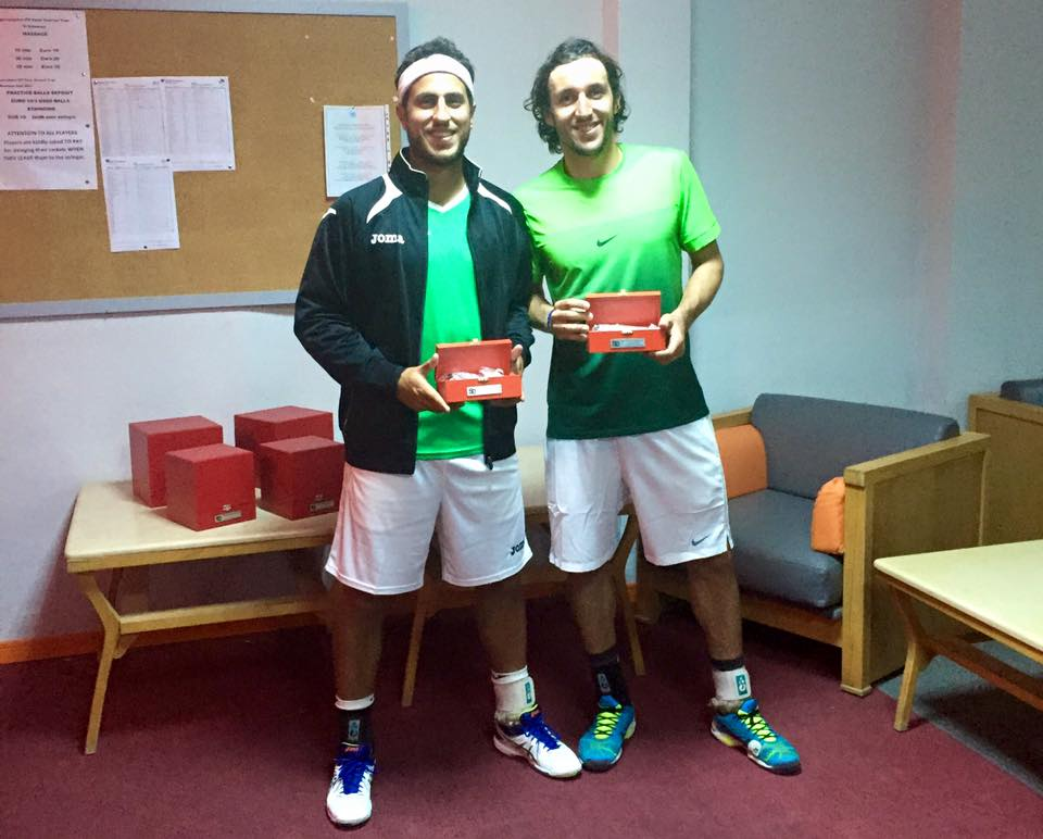 Vasko Mladenov y Anis Ghorbel